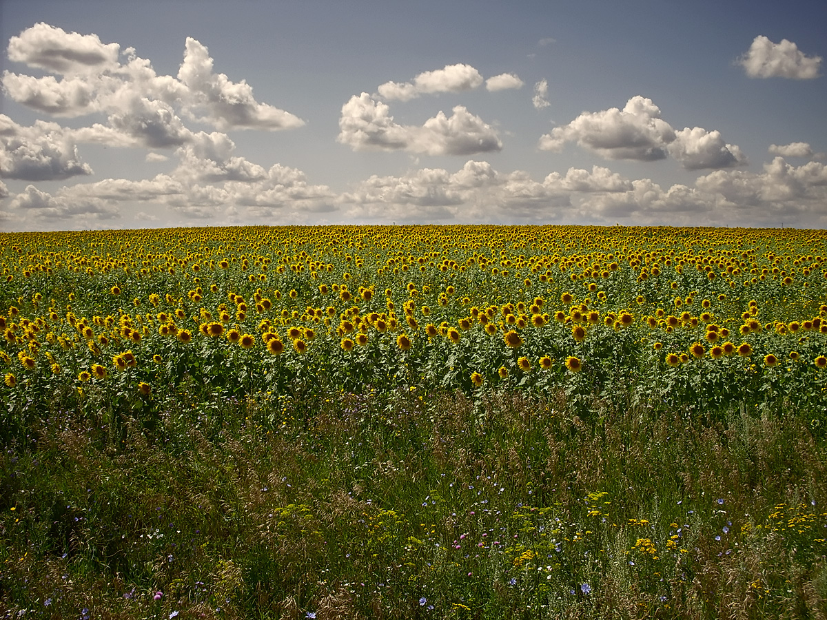 подсолнух